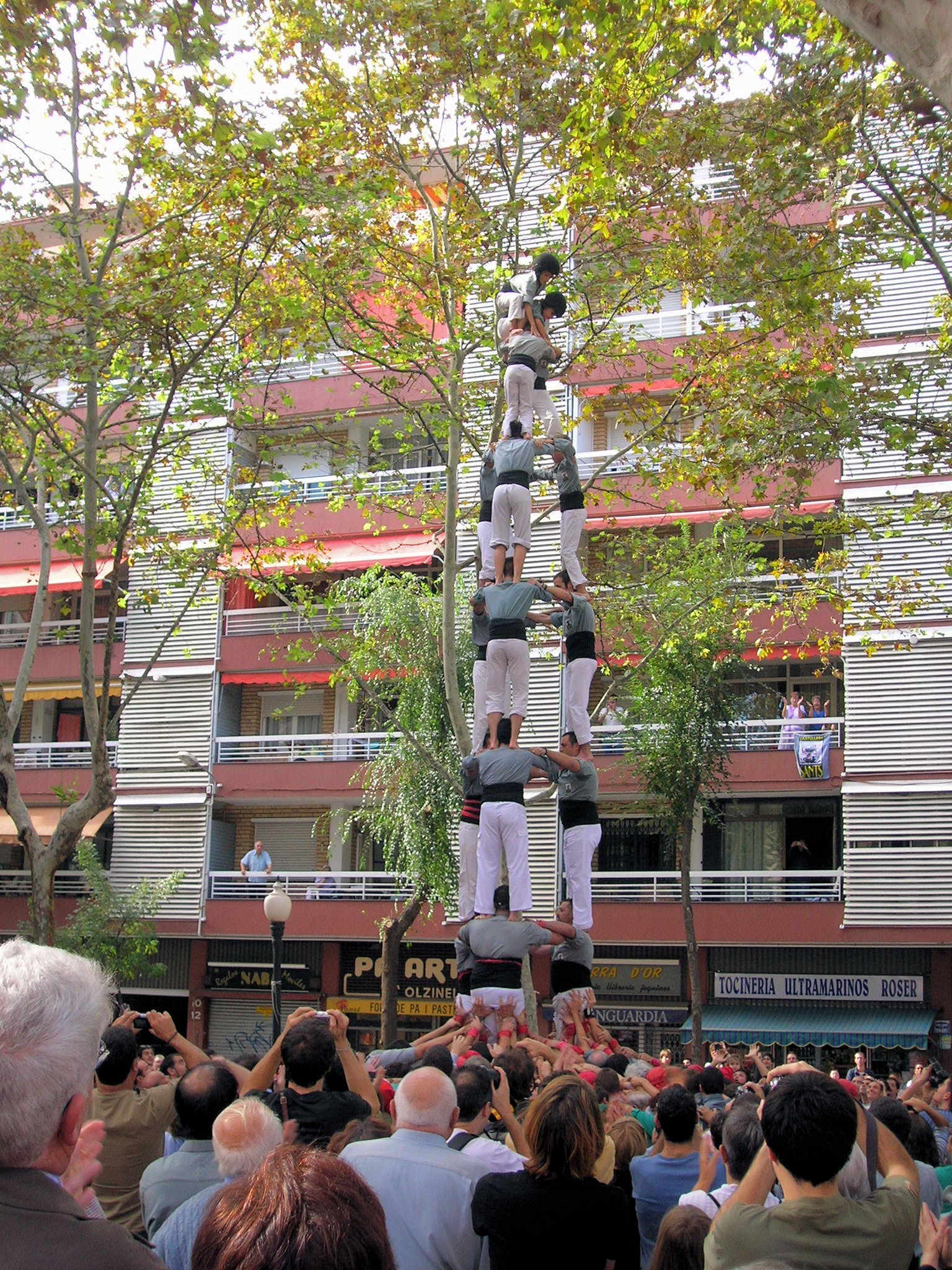 14a Diada dels Castellers de Sants